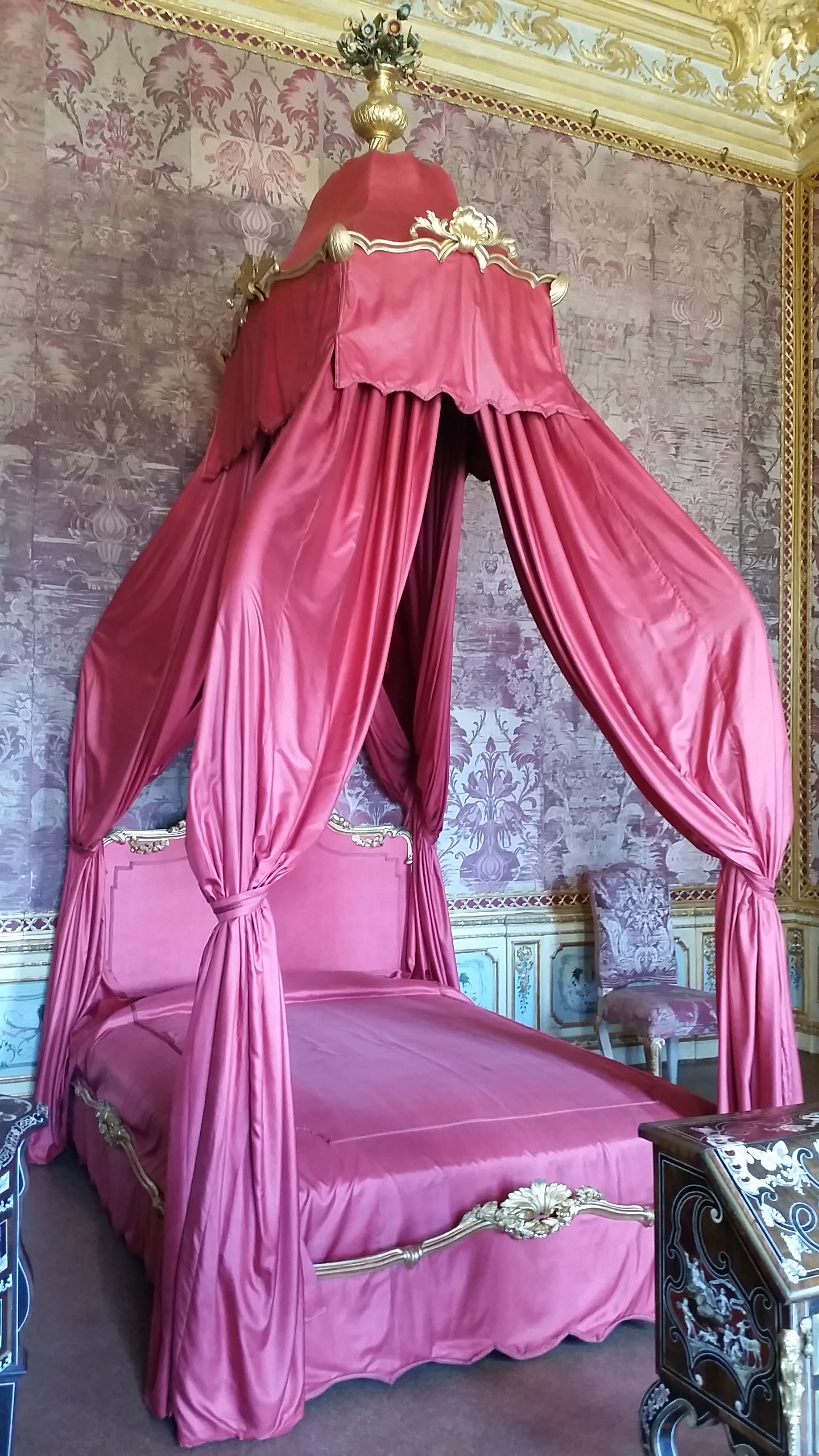 Letto a baldacchino (databile al XVIII secolo) nella "camera da letto" della palazzina di Stupinigi, Stupinigi, frazione di Nichelino, Piemonte, Italia.